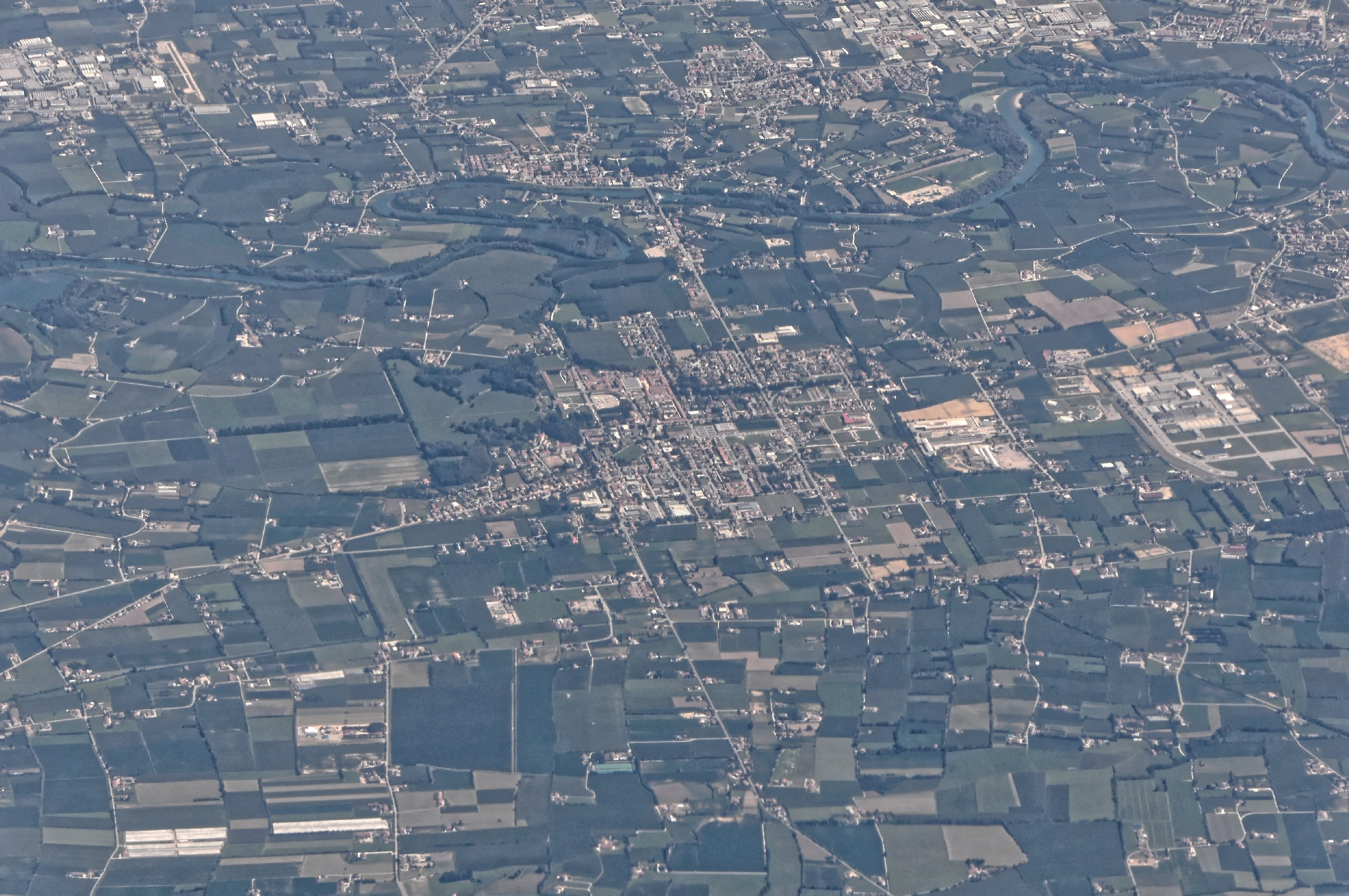 Bilder vom Flug -Rom-Düsseldorf-Hamburg 2013 Dieses Foto entstand in Zusammenarbeit mit Stadtbesichtigungen.de Die Seiten Stadtbesichtigungen.de, der dazugehörige Reise Blog sowie die Facebookseite: Stadtbesichtigungen Rom dürfen dieses Bild für Ihre Veröffentlichungen ohne den Hinweis auf Wikipedia, Commons bzw der Lizenz verwenden. Die Verantwortlichen habe von mir (Ra Boe) die Originaldaten zur freien Verfügung übermittelt bekommen.